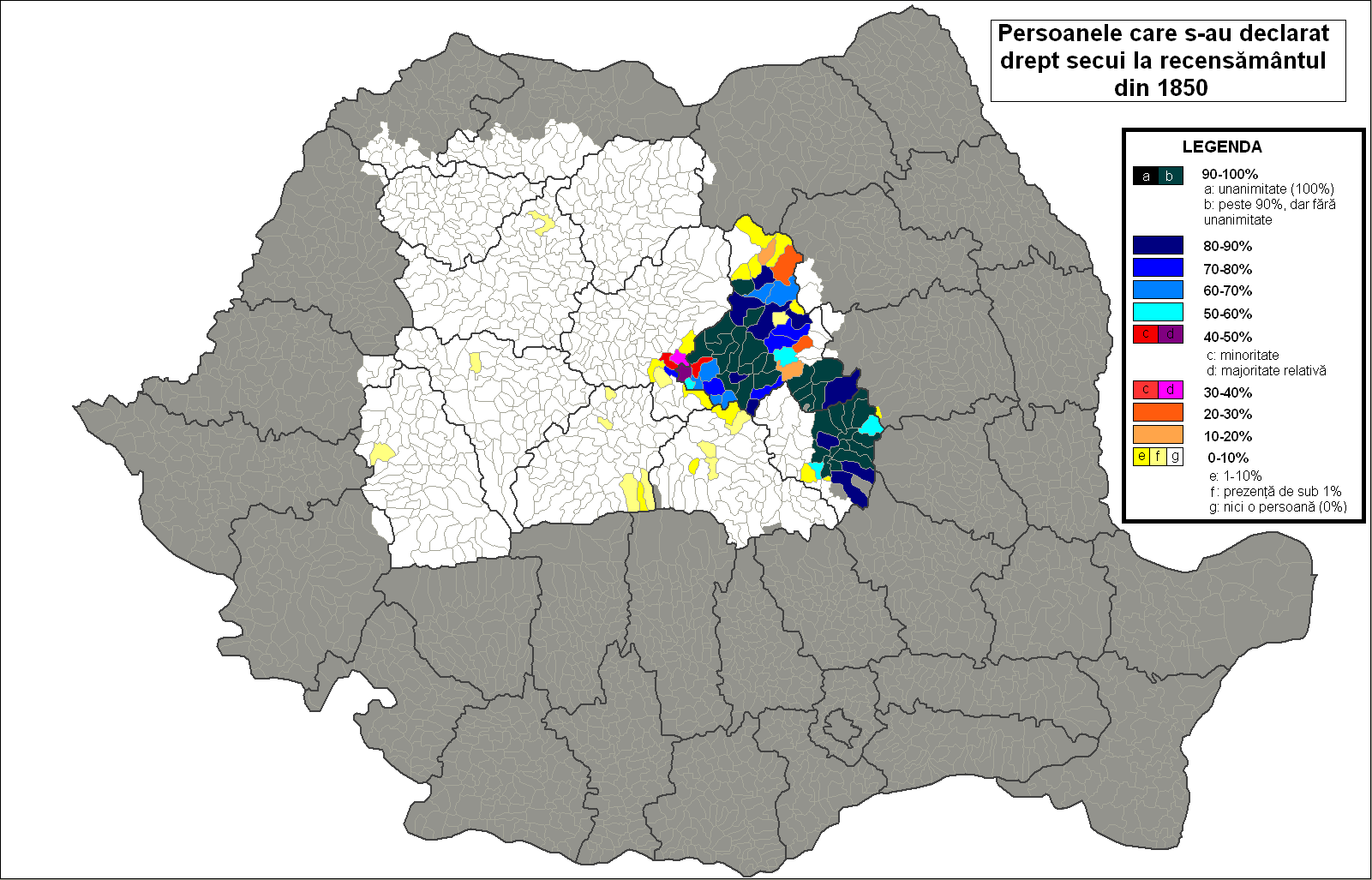 Persoanele declarate drept "secui" la recensământul organizat de autorităţile habsburgice în Transilvania în anul 1850. Se pot observa mare diferenţe regionale. Secuii din fostele scaune Arieș, Mureș şi Miklósvár (Trei Scaune) s-au declarat de regulă "maghiari". Secuii din fostele scaune Ciuc, Chizd (Trei Scaune), Orbai (Trei Scaune) şi Tileagd (Odorhei) s-au de regulă "secui". Harta reprezintă limitele administrative actuale: judeţe, comune, oraşe.